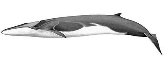 Rorcual común (Balaenoptera physalus), también llamado ballena de aleta